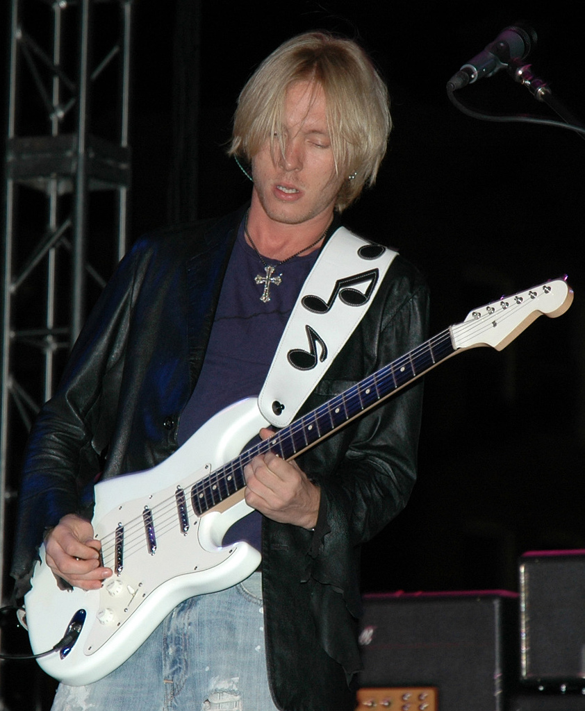 Deadwood Jam, Deadwood, S.D. Sept. '05